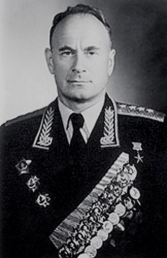 Иван Александрович Серов (1905 — 1990) — деятель советских спецслужб